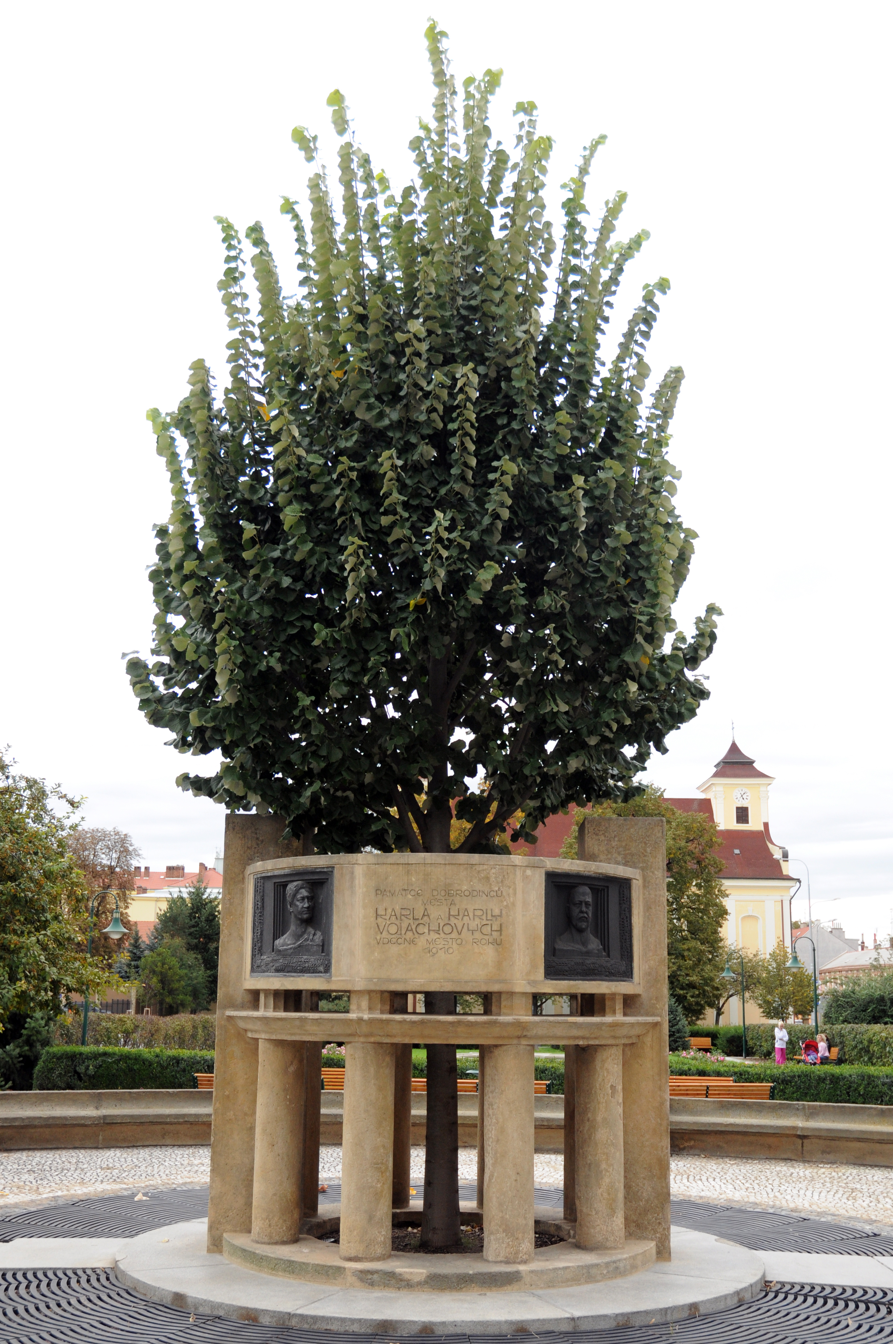 Pomník manželů Vojáčkových (Prostějov), Vojáčkovo nám., Hlaváčkovo nám., Prostějov